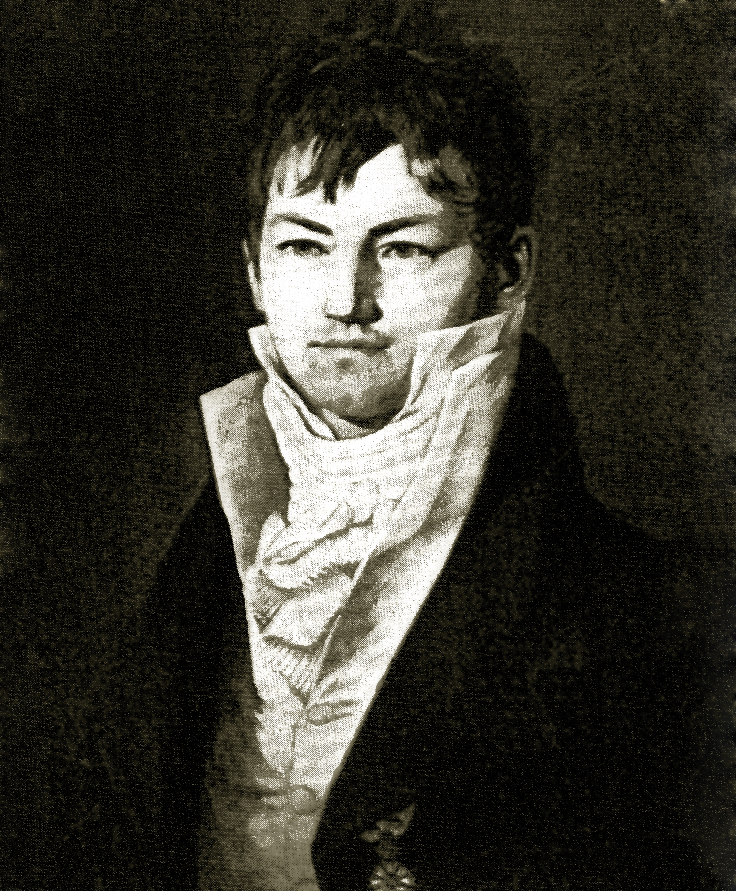 Porträt von Joseph Ernst von Koch-Sternfeld, salzburgisch-bayerischer Beamter, Geograph, Historiker und Schriftsteller